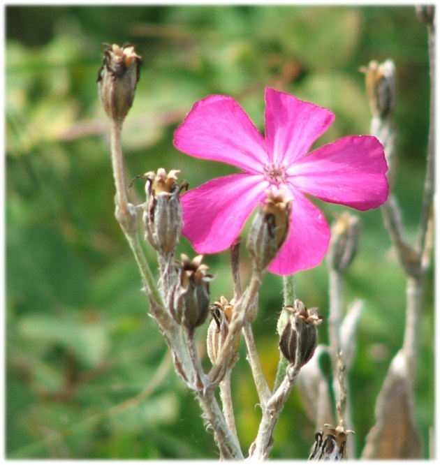 Lychnis coronaria